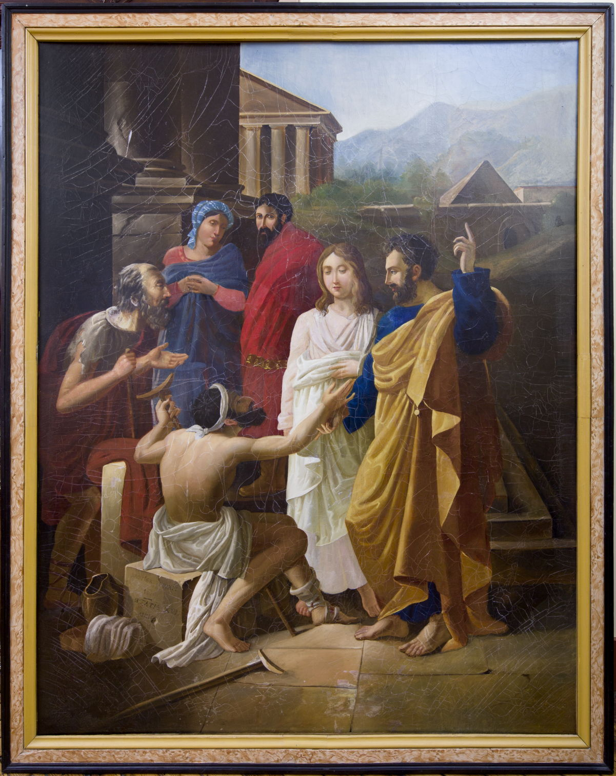 tableau de Theophile Gautier évoquant des détails de Mauperthuis